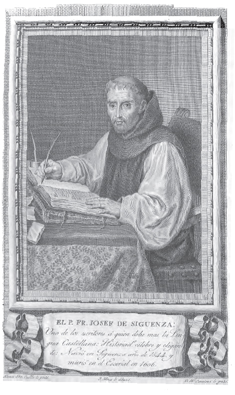 Retrato de José de Sigüenza.